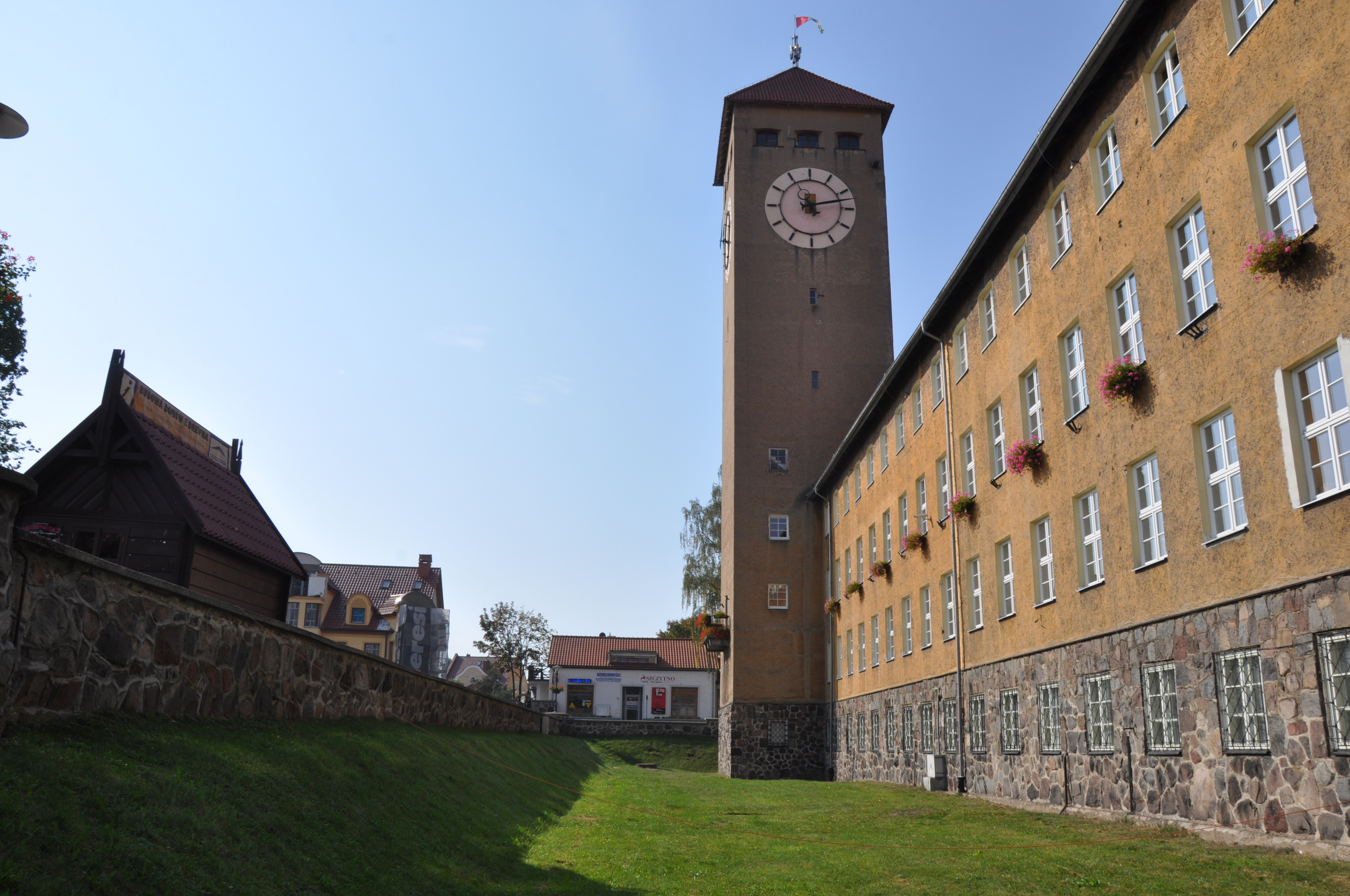 Szczytno, ratusz, 1937